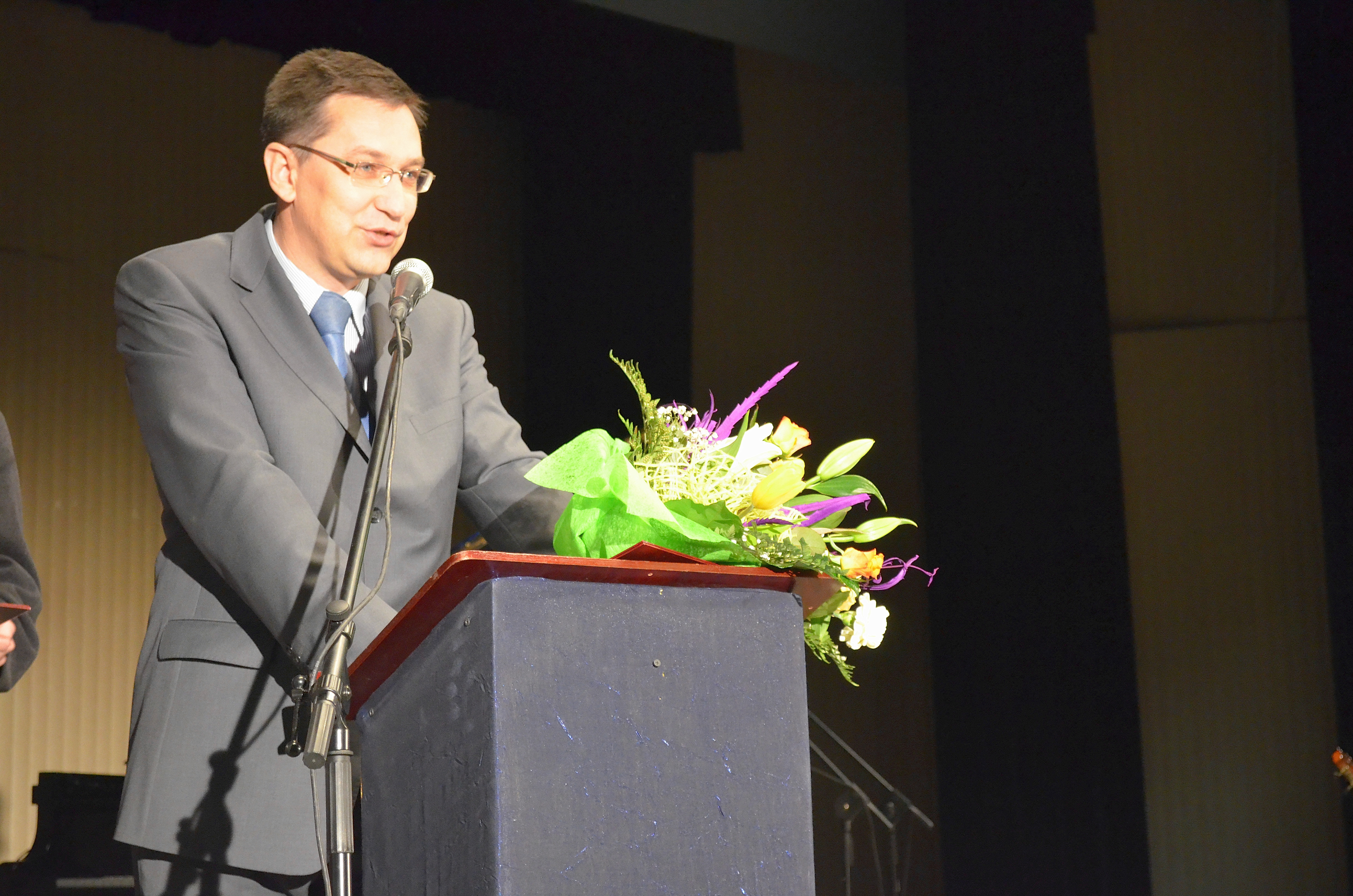 Dariusz Kupisz Laureat Nagrody Literackiej Miasta Radomia 2011 w kategorii książka naukowa/popularnonaukowa.